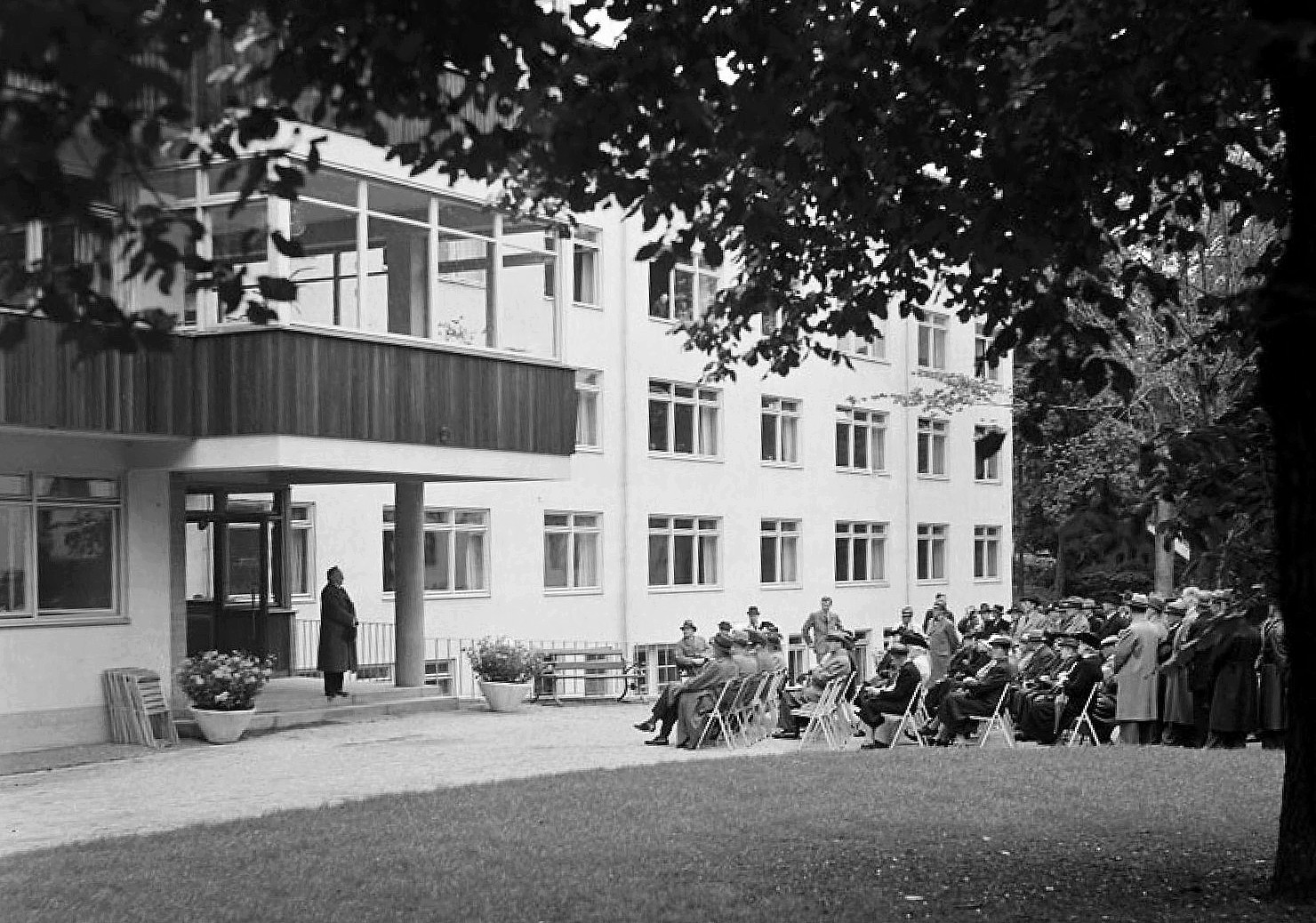 Sabbatsbergs vård- och ålderdomshem. Sabbatsbergs nya vårdhem invigs, med en ceremoni på planen framför byggnaden.